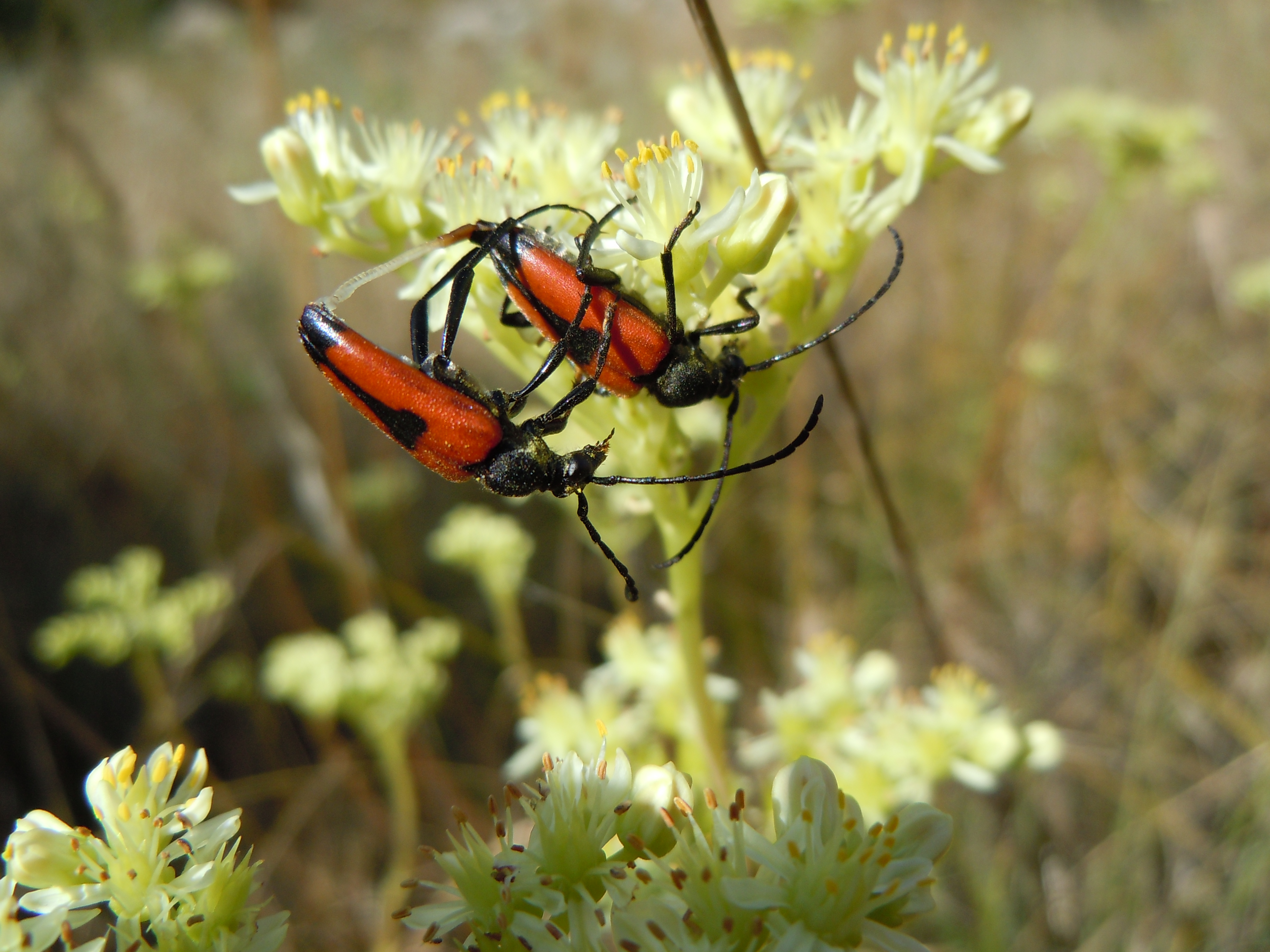 Stictoleptura cordigera - Accouplement sur un Orpin de Nice - Ardèche - France